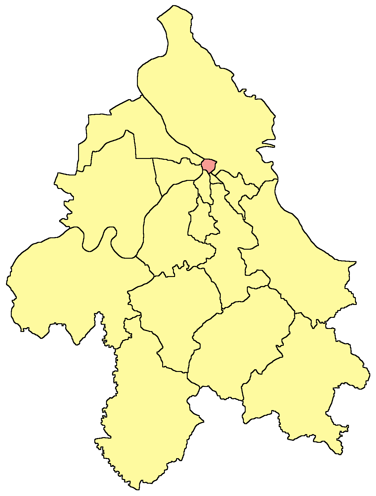 Belgrade municipality map